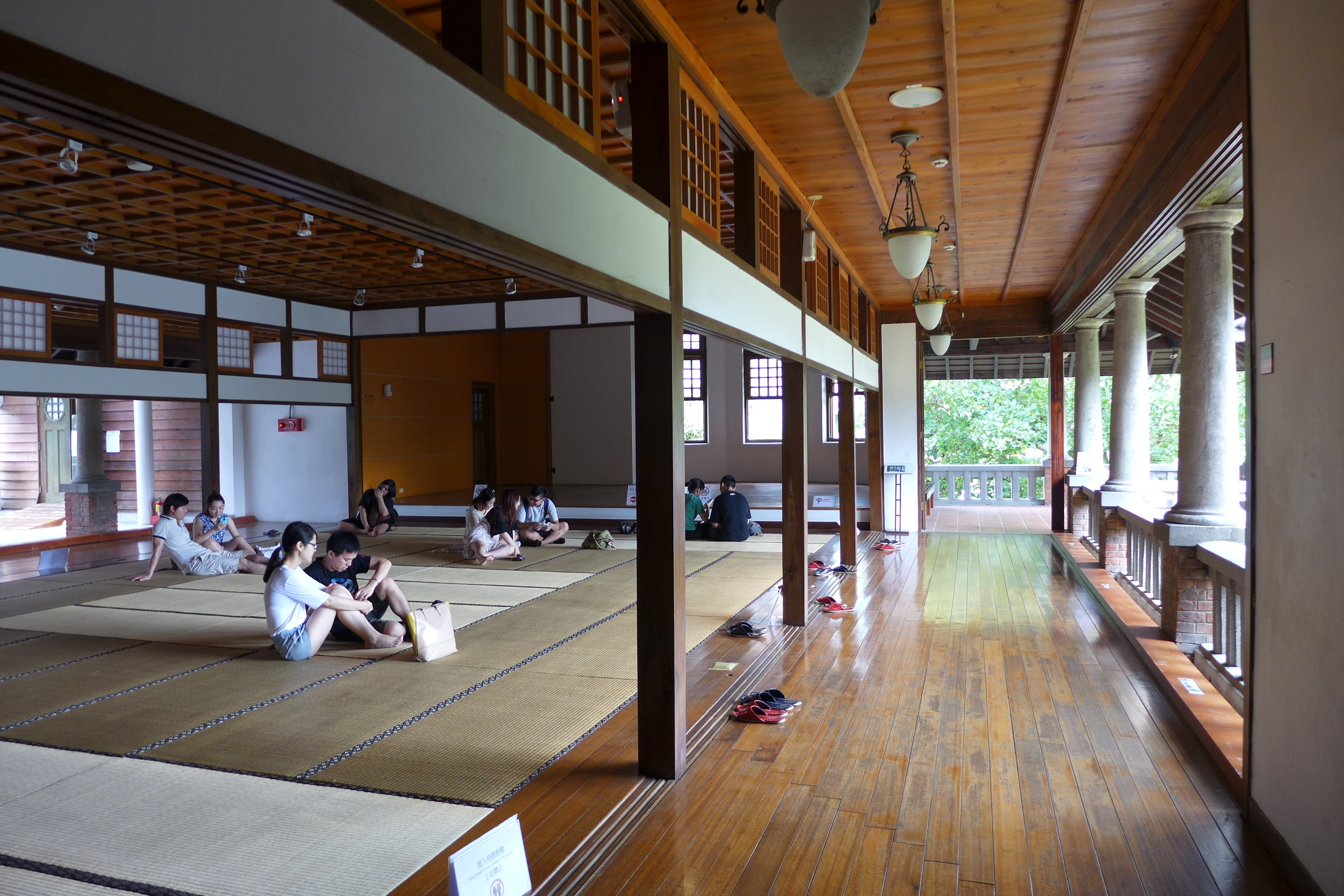 Beitou Hot Spring Museum Interior